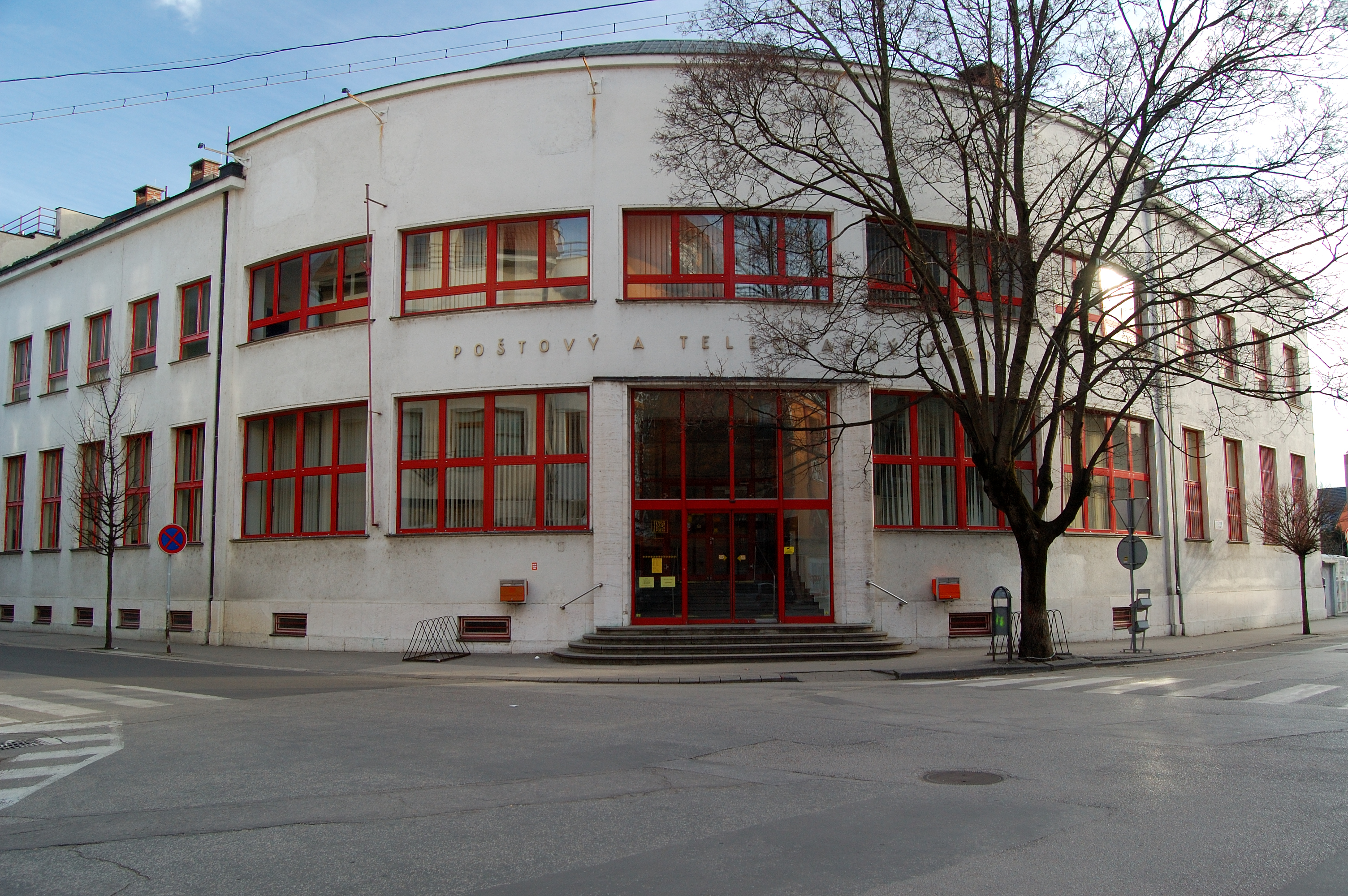 Pošta